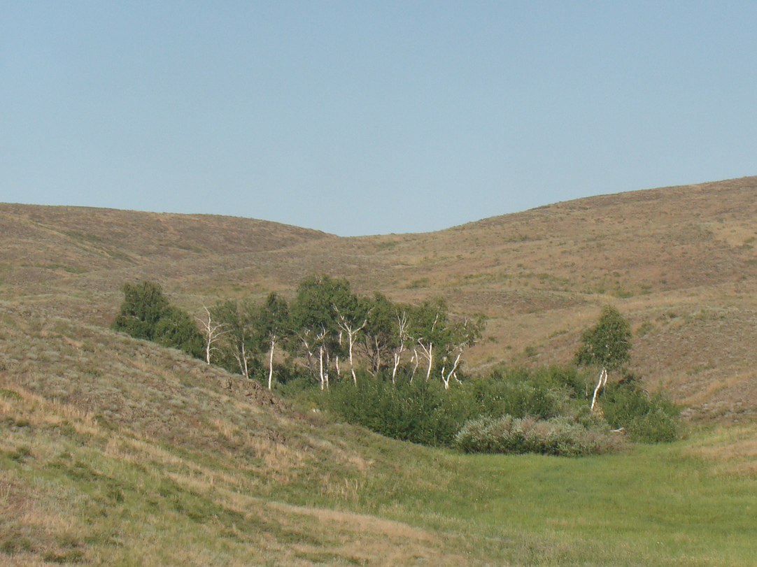 Актюбинская область. Горы Мугоджары. Берёзовая роща.